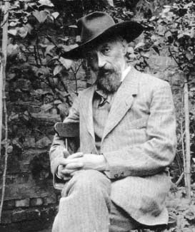 Retrat d'Eduard Study (1862-1930), matemàtic alemany